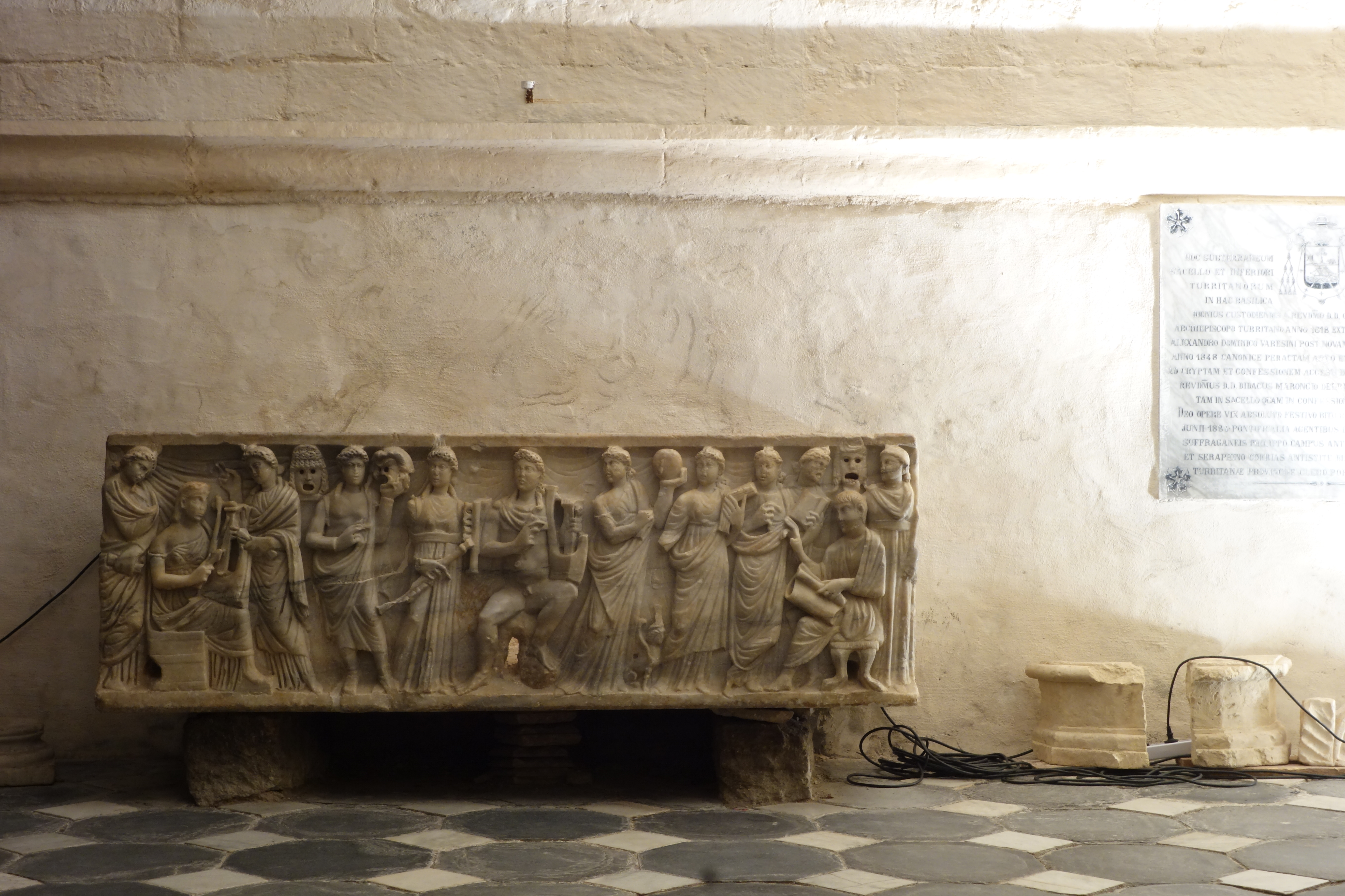 Basilica di San Gavino